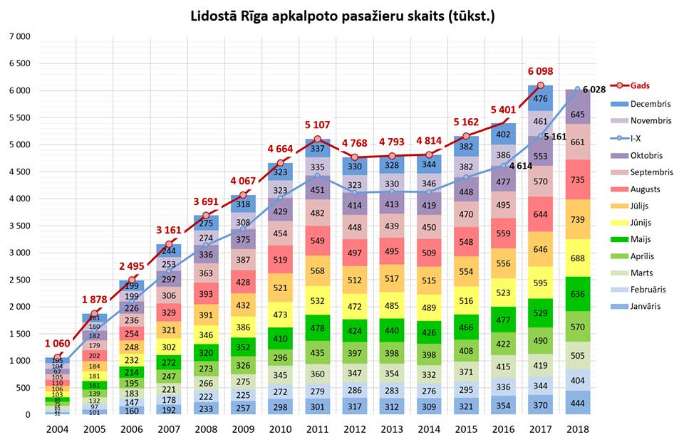 Lidosta Rīga apkalpoto pasažieru skaits